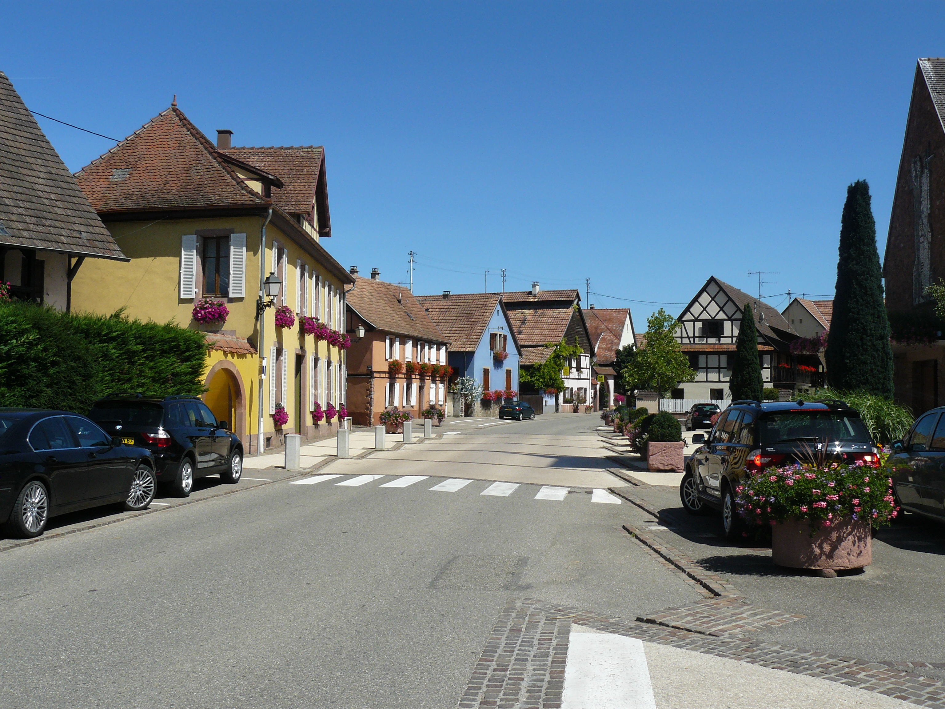 Le village d'Illhaeusern